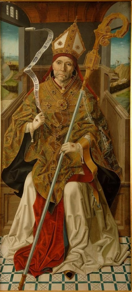 El lienzo representa a San Atanasio de Alejandría († 373), doctor de la Iglesia Católica y uno de los Padres de la Iglesia Oriental.